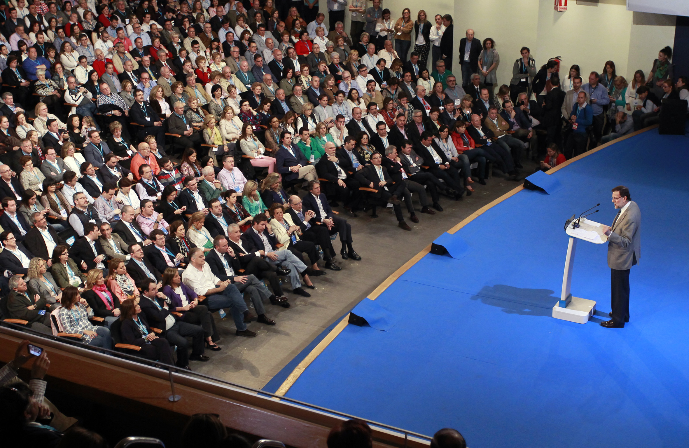 21 Intermunicipal del PP en Valencia